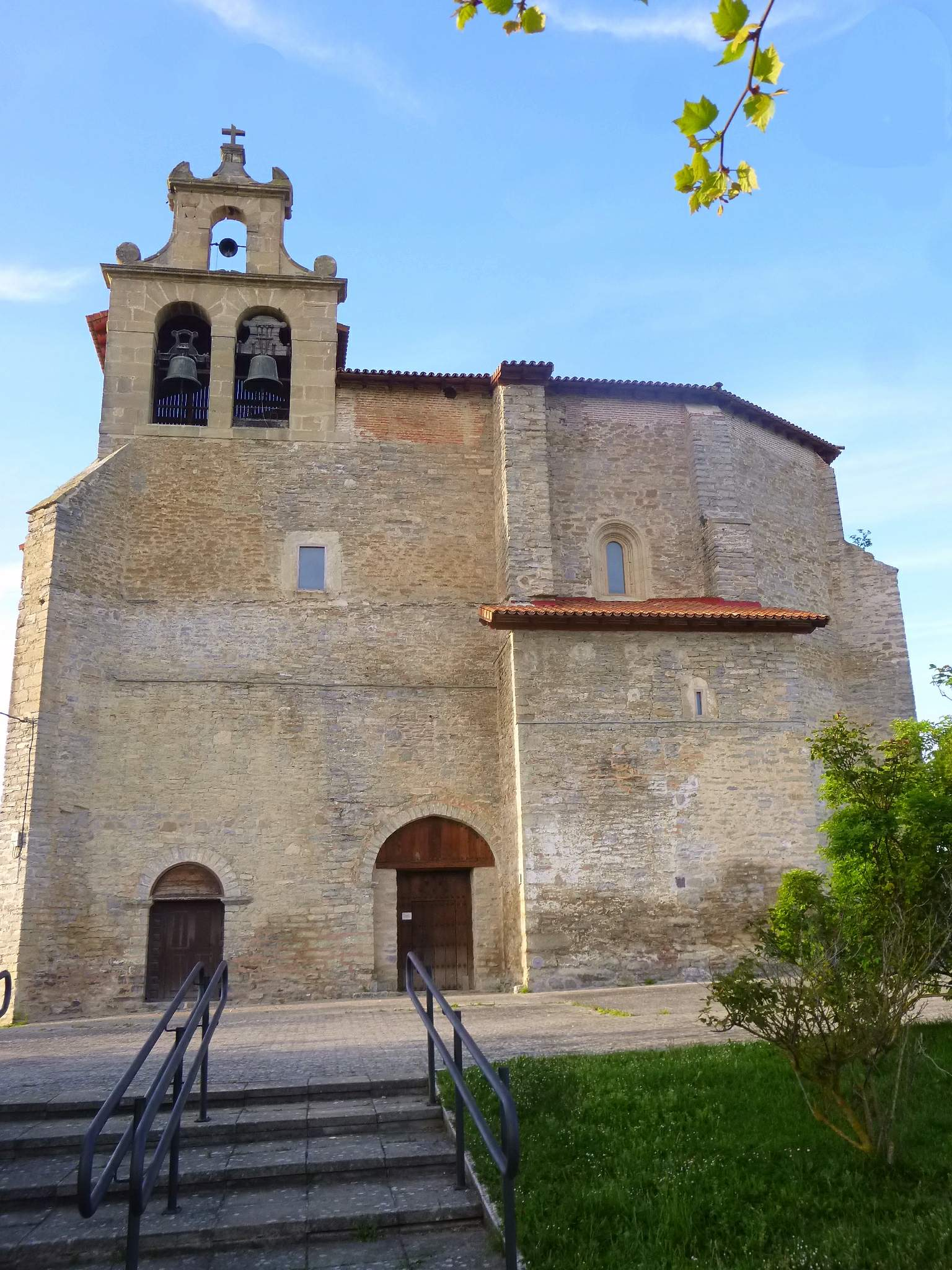 Lermanda (Vitoria, Álava) - Iglesia de San Sebastián